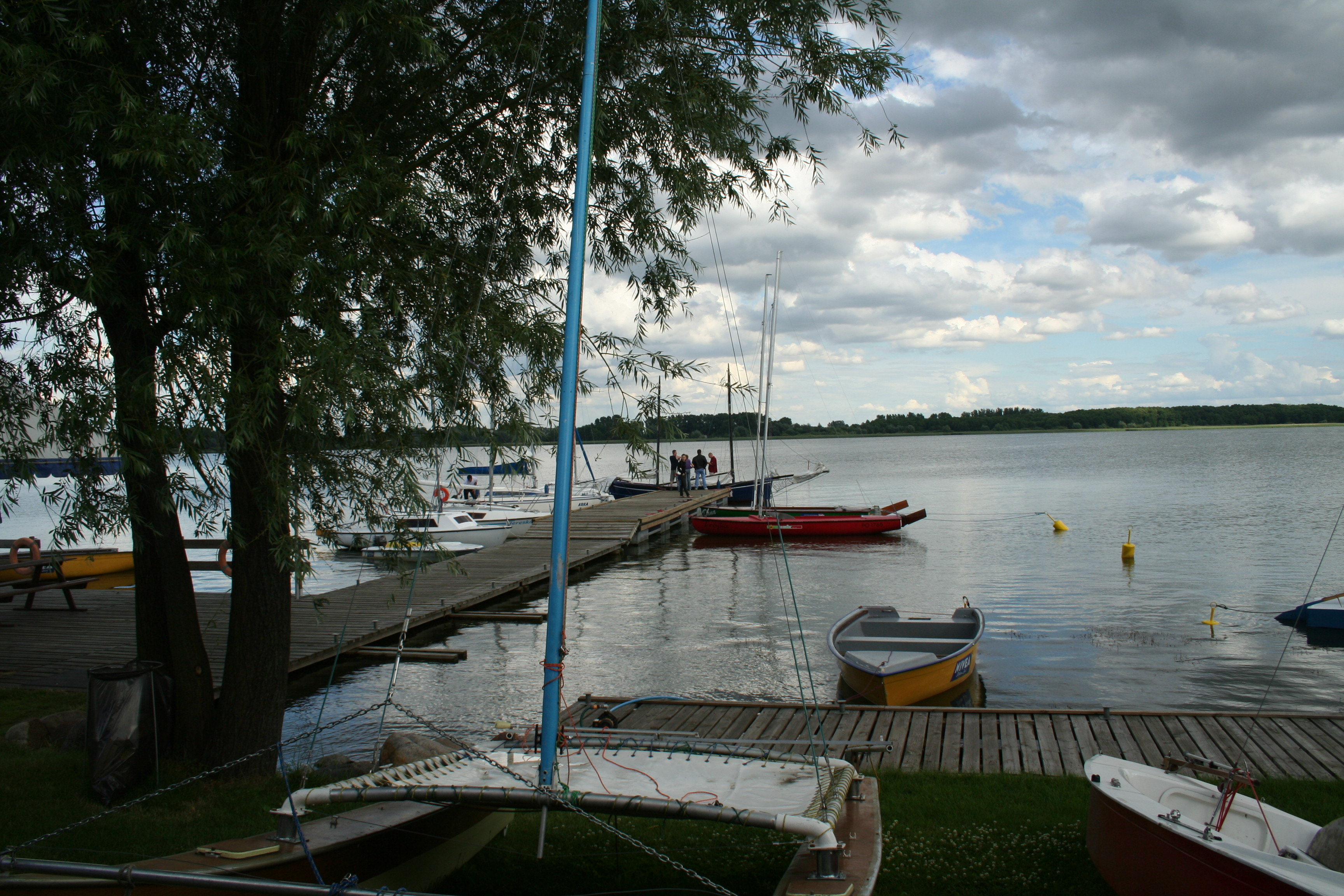 Le lac Wolsztyńskie